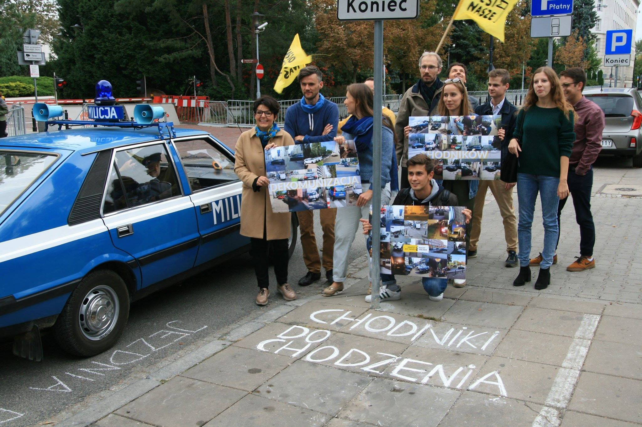 Happening Miasto Jest Nasze i koalicji Ruchów Miejskich ws. zmiany przepisów dotyczących parkowania na chodnikach. Od lewej: Justyna Glusman, Jarosław Kisiel, Katarzyna Homan, Patryk Słowicki, Aleksandra Wilczyńska, Andrzej Zajączkowski, Zuzanna Kunert, Jan Popławski, kuca Bartłomiej Gołąbek, z tyłu z flagami Marcin Chlewicki i Wojciech Łuczka